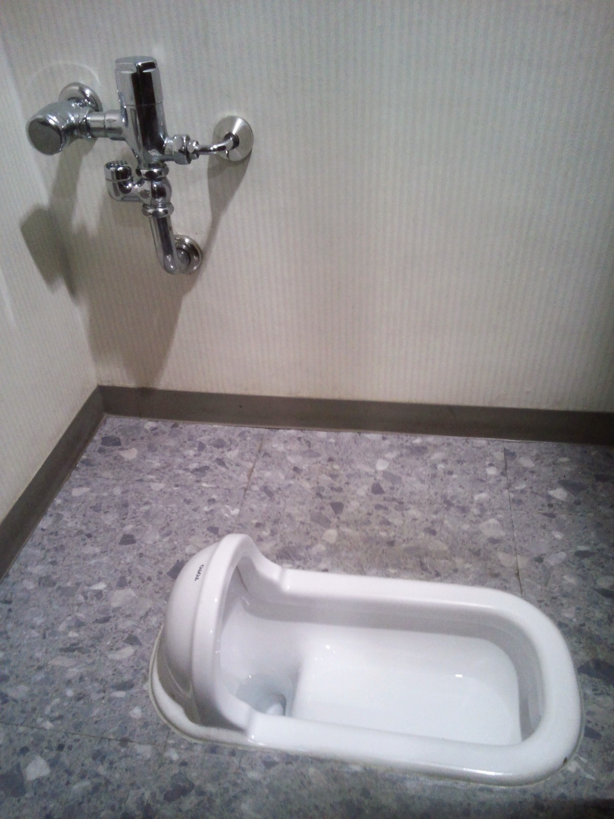 TOTO C75-4